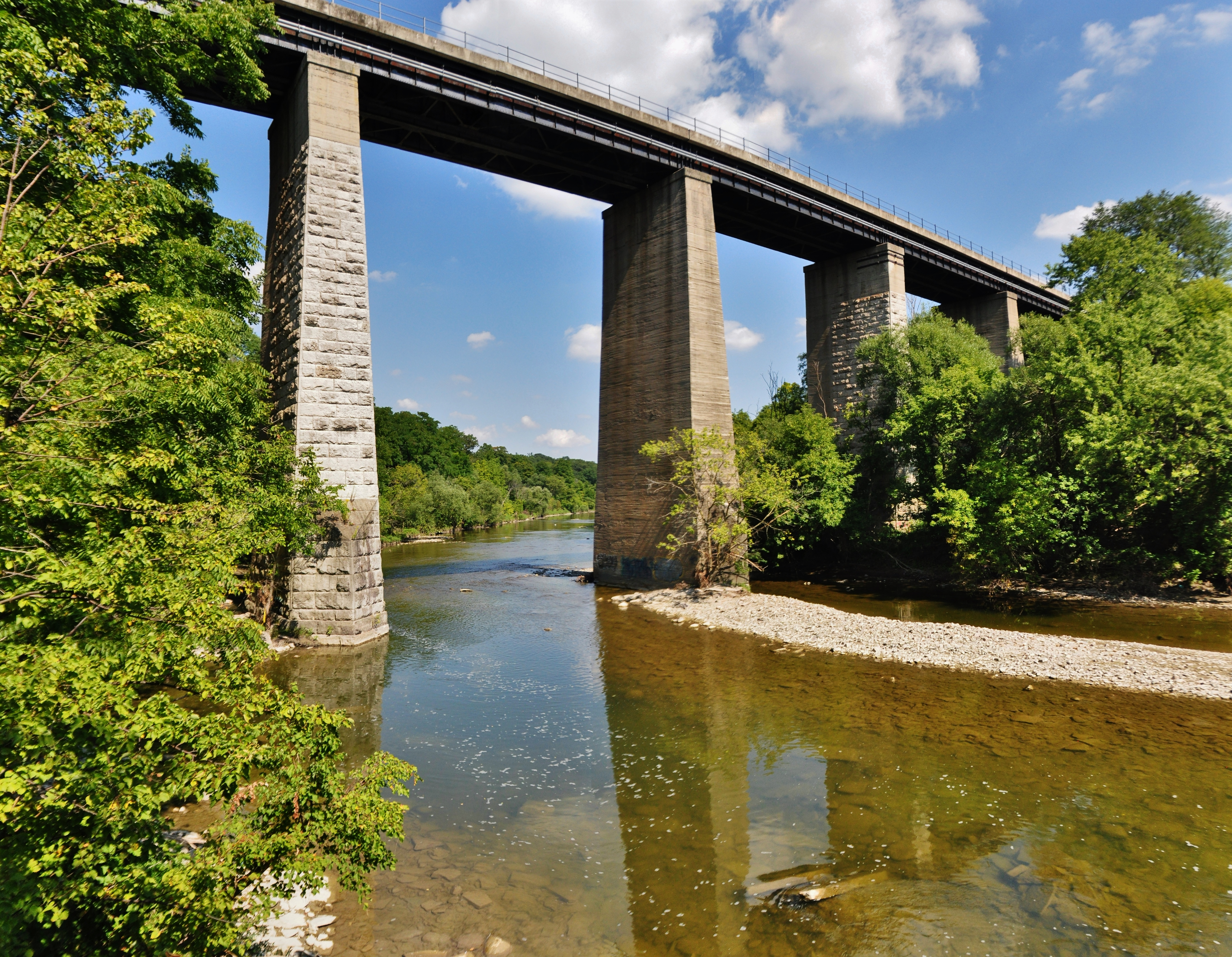 Залізничний міст через річку Гамбер у Торонто